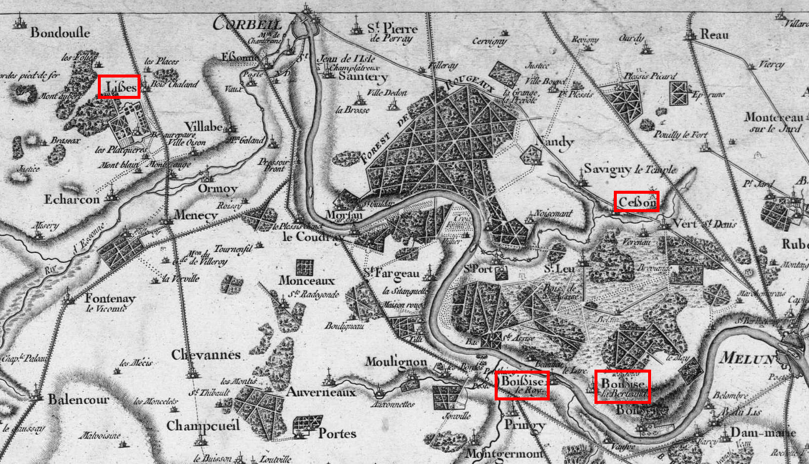 esszet sur la carte de Cassini n°7 (autour de Corbeil): Lisses, Cesson, Boissise le Roi et Boissise la Bertrand.